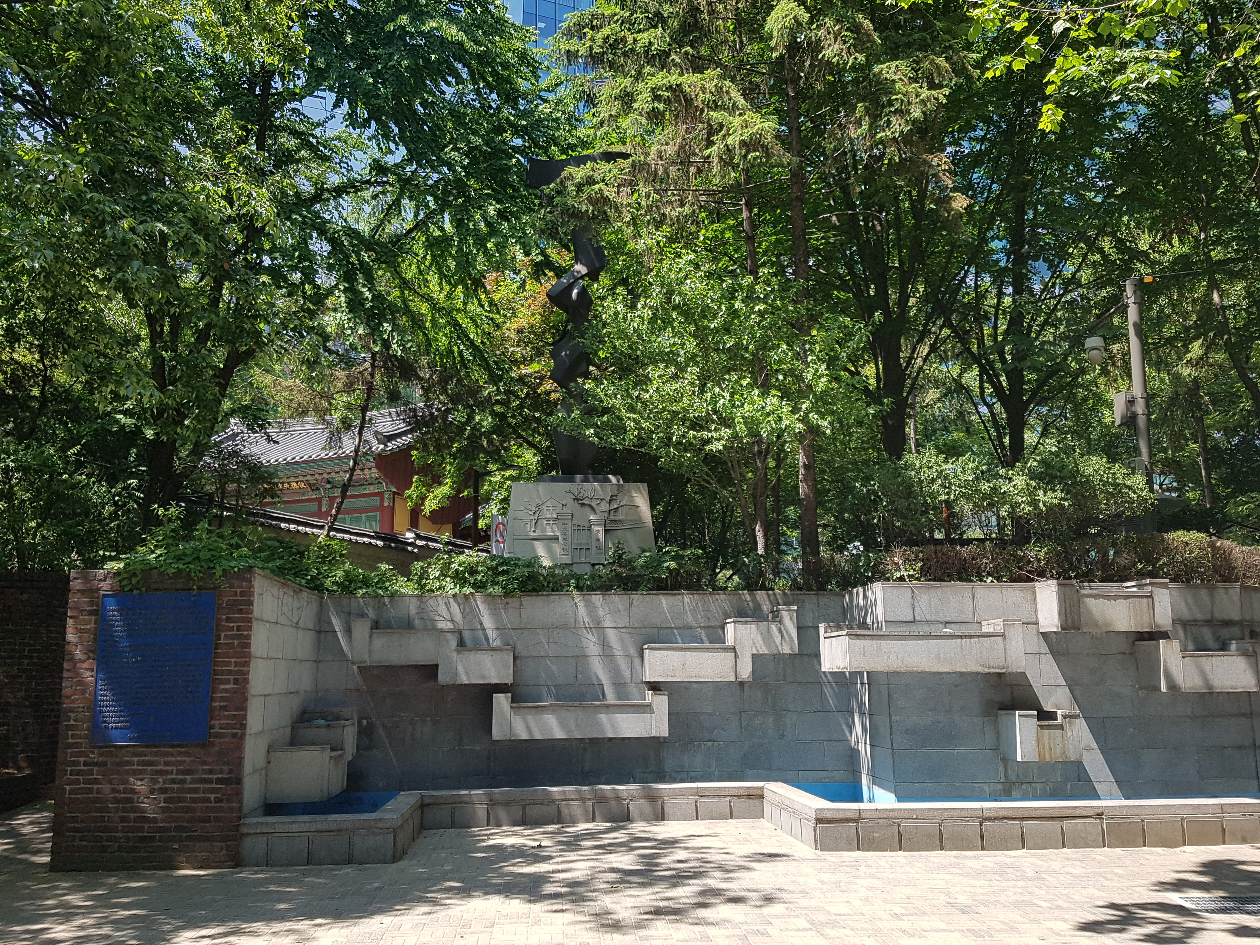 일제의 방화 이후 남아 있는 보성사의 터이다. 현 종로구 조계사 경내에 위치하고 있다.